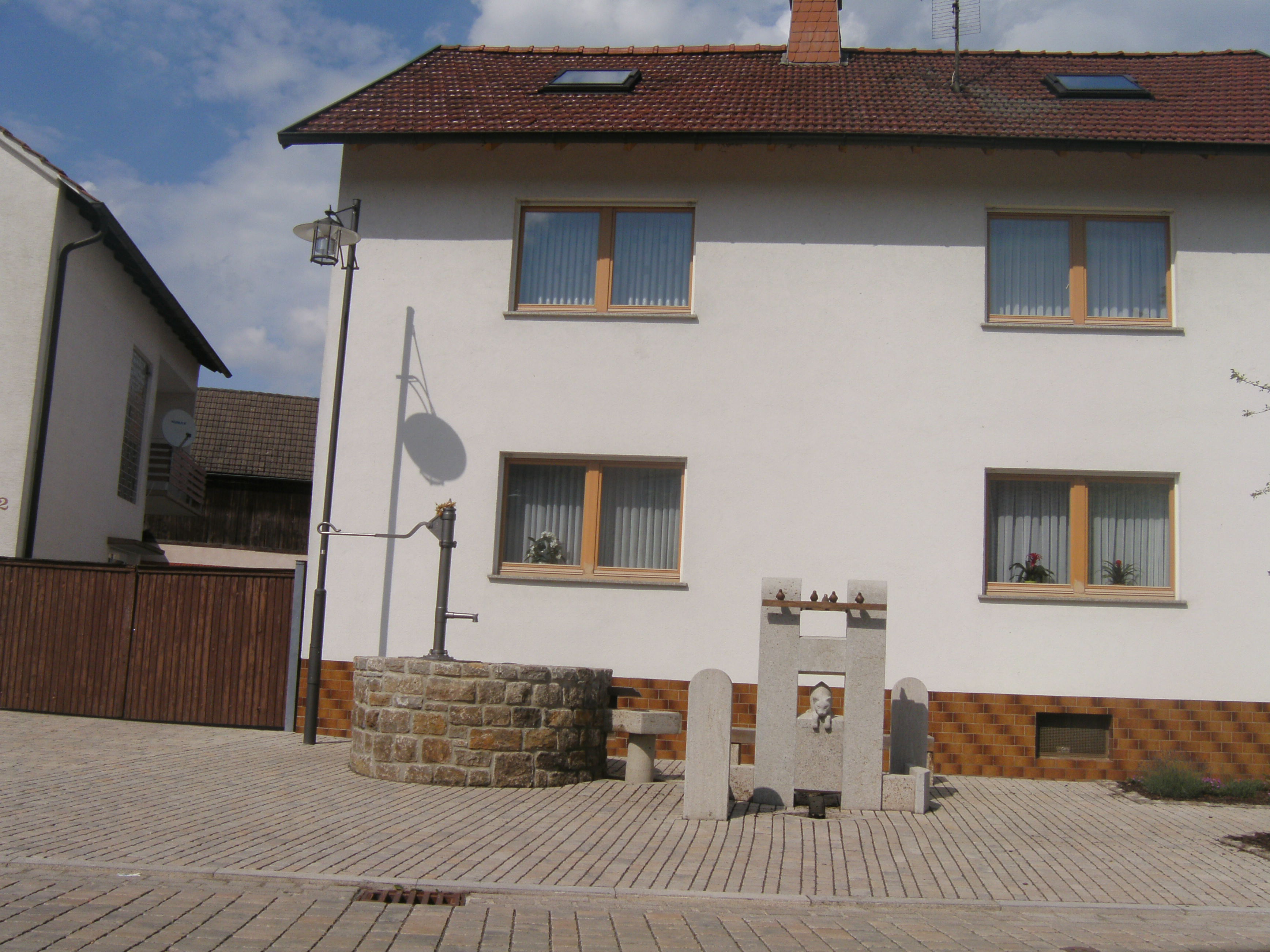 Spirkenbrunnen in der Dorfmitte. Die Spirken (Spatzen) ist ein Dorfname von Rottershausen